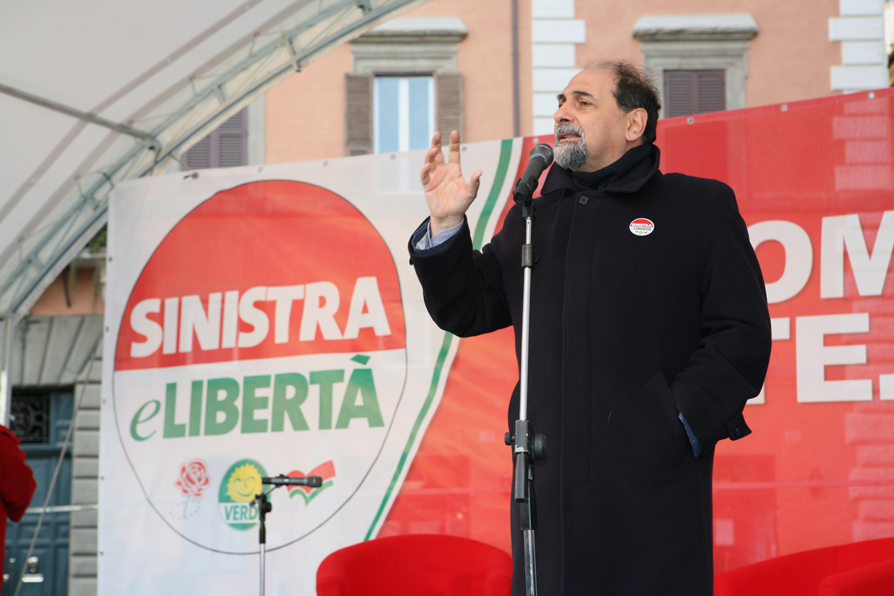 Il rappresentante di Sinistra e Libertà Umberto Guidoni parla sul palco di Sinistra e Libertà in occasione della presentazione della lista a Piazza Farnese, Roma.